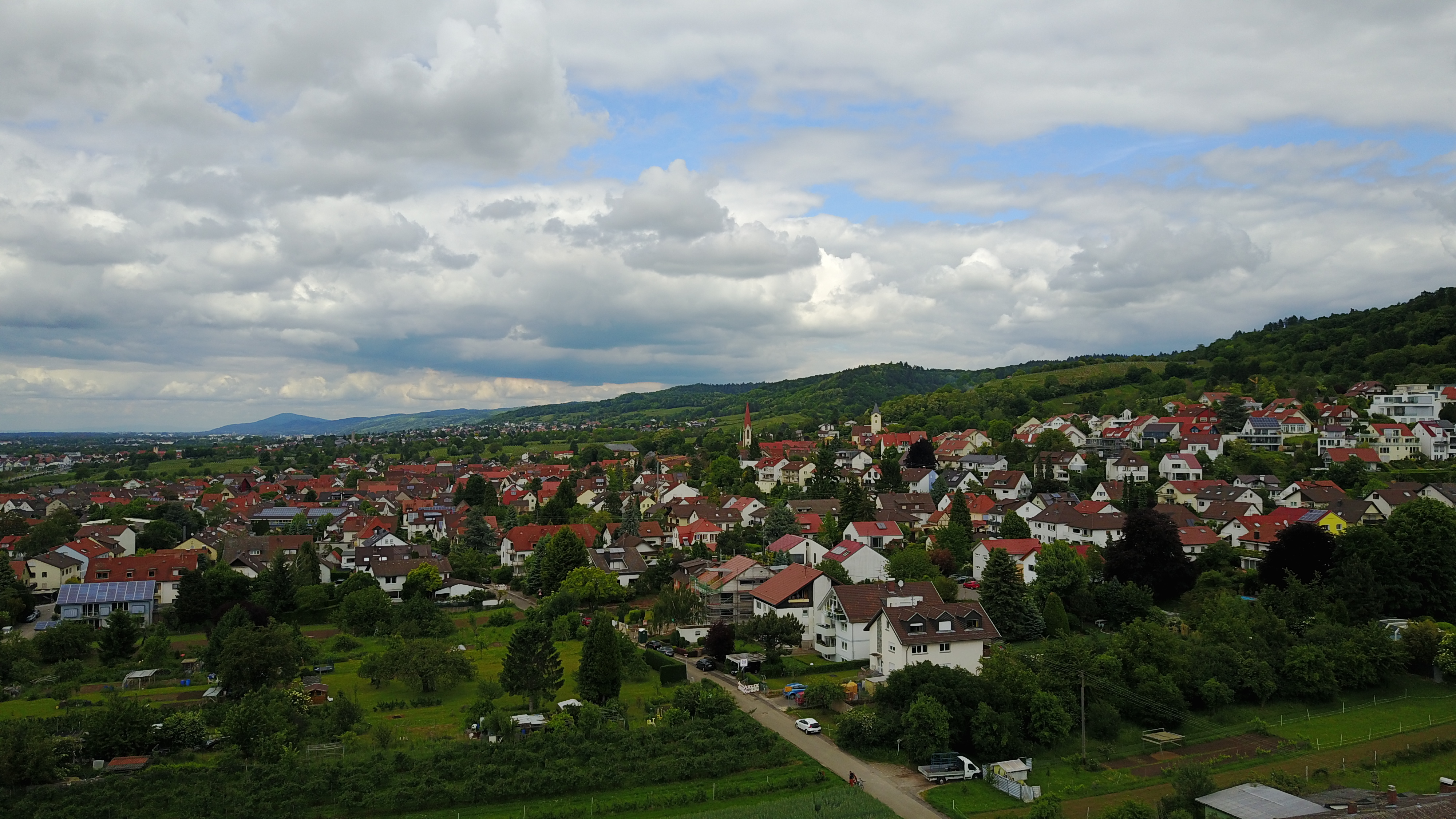 Hirschberg Leutershausen Luftaufnahme von Süd